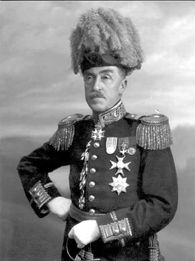 Generalmajor Bror Munck, Inspektör för kavalleriet 1915-1917